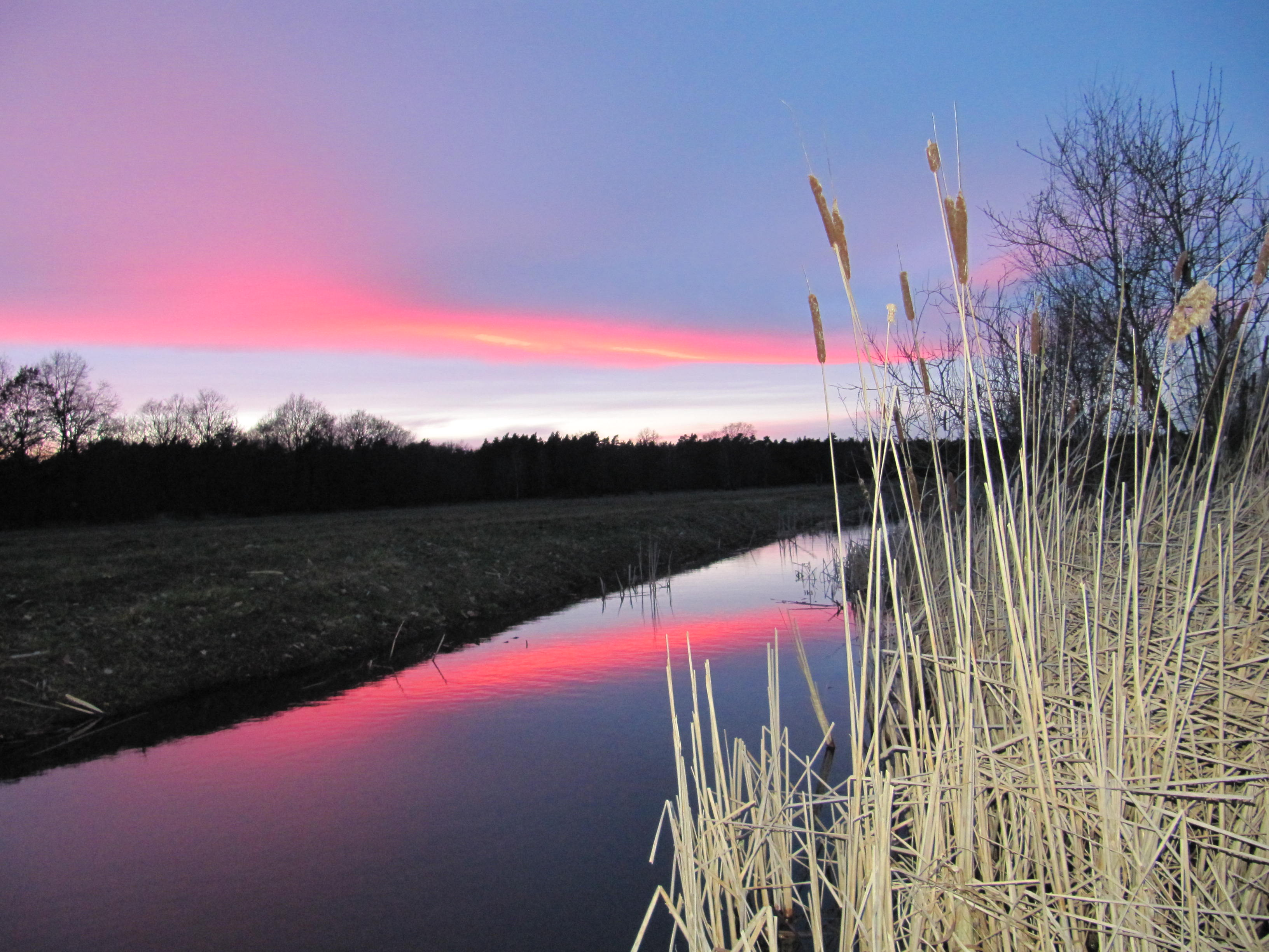 Abends am Graben